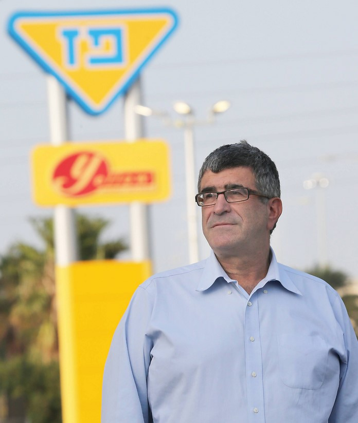 מנכ"ל פז לשעבר יונה פוגל